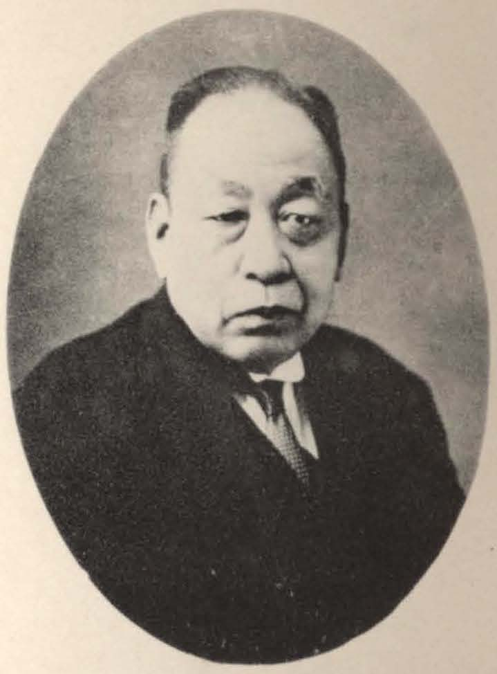 Bân-lâm-gú: 赤司初太郎 Akashi Hatsutarō